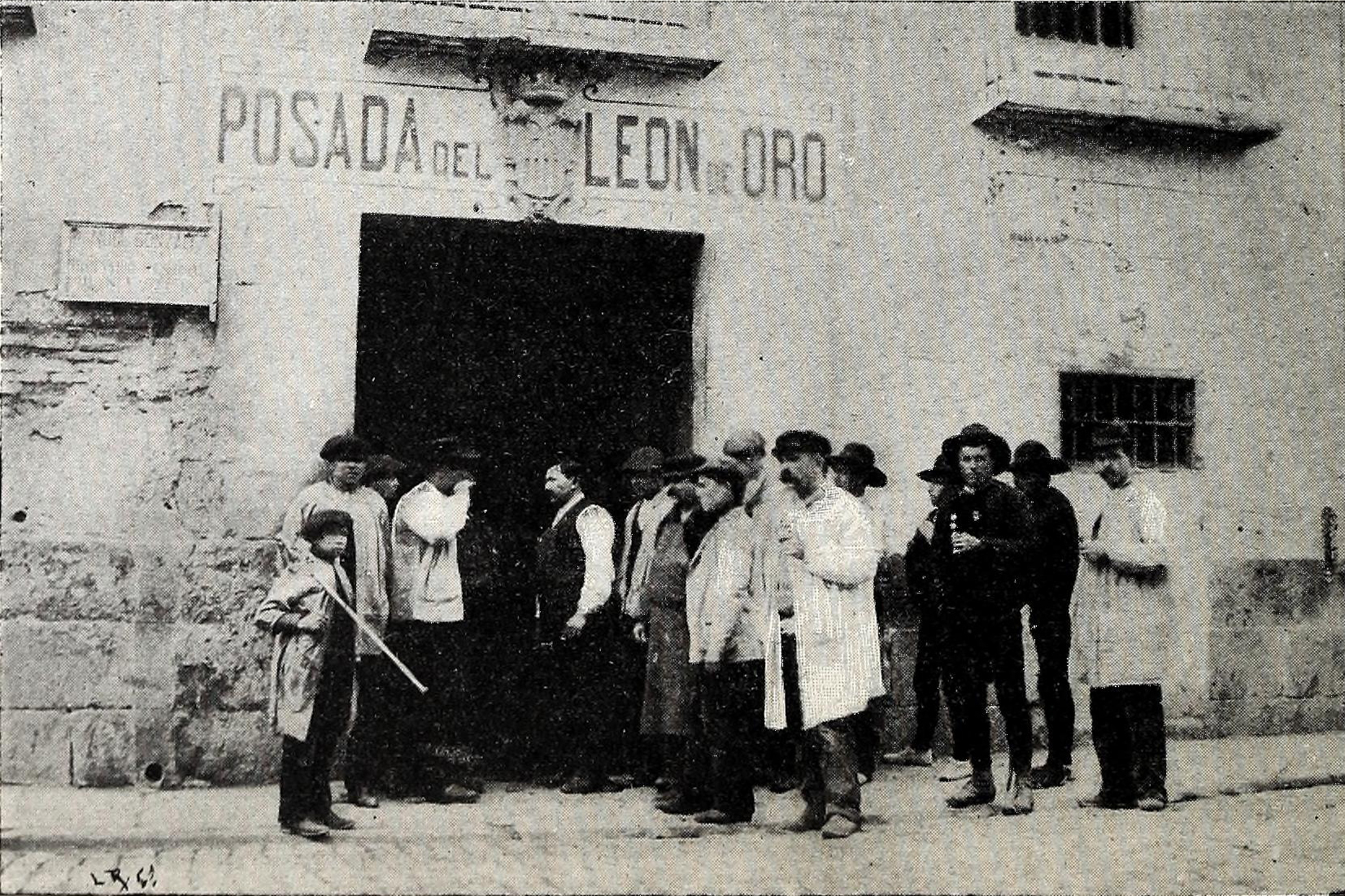 En espera del ordinario. Posada del León del Oro, en la Cava Baja, nº 12 (Madrid).